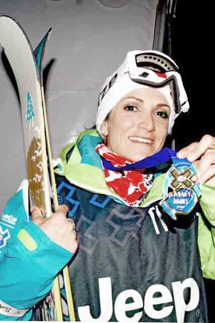 Marie Martinod lors de sa victoire dans l'épreuve de Half-Pipe aux X-Games de Tignes 2013